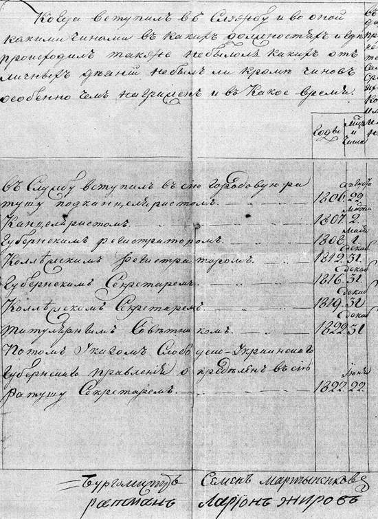 Формулярний список 1828 року